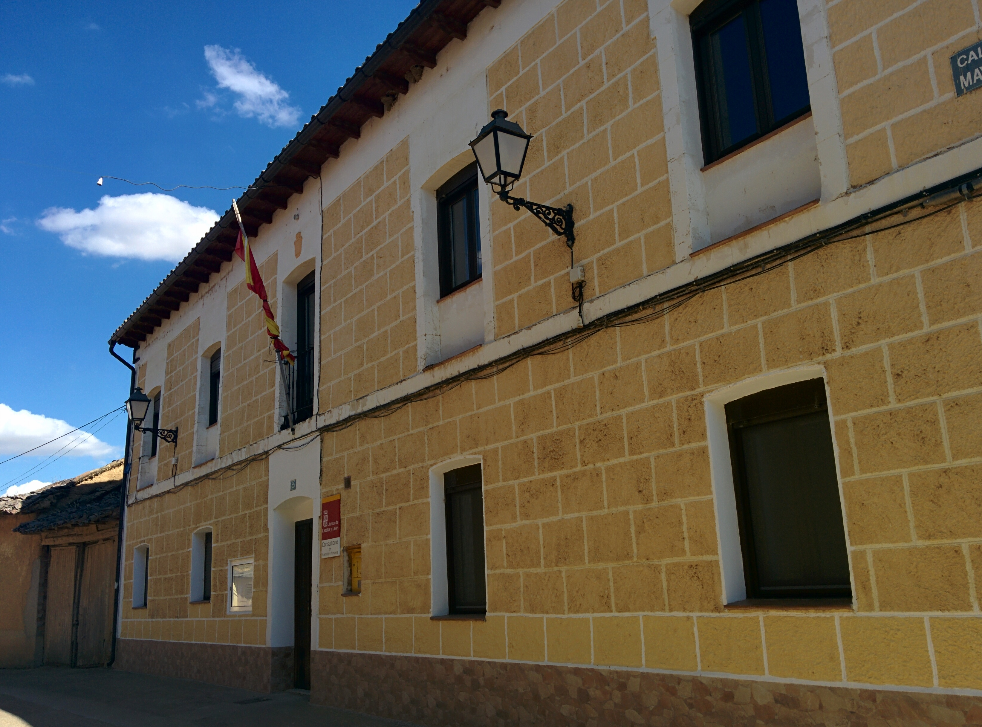 Casa consistorial de Villacidaler (Palencia, España).